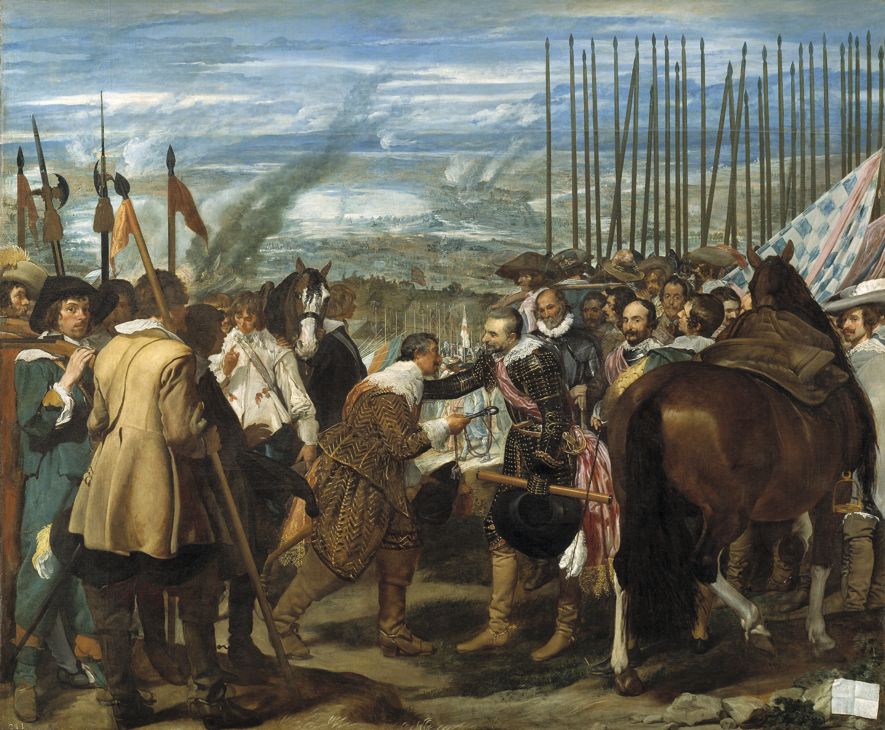 La obra representa el momento en que Justino de Nassau rindió la ciudad de Breda, en 1625, a las tropas españolas al mando del general Ambrosio Spínola, que aparece recibiendo las llaves de la ciudad de manos de su enemigo.